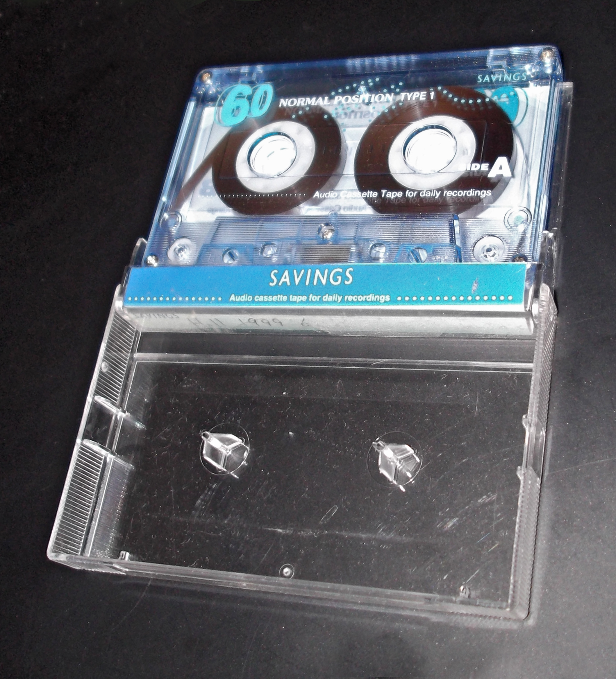 撮影者本人の所有物です。